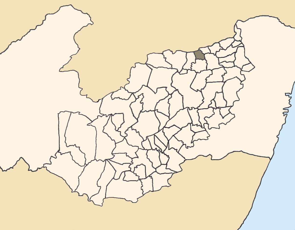 Mapa da mesorregião Agreste de Pernambuco (Brasil) subdivida em municípios. Em destaque, o município de Santa Maria do Cambucá. Map of the brazilian state of Pernambuco (mesorregião Agreste) showing the city of Santa Maria do Cambucá. Imagem tratada com o GIMP. Image made with GIMP.